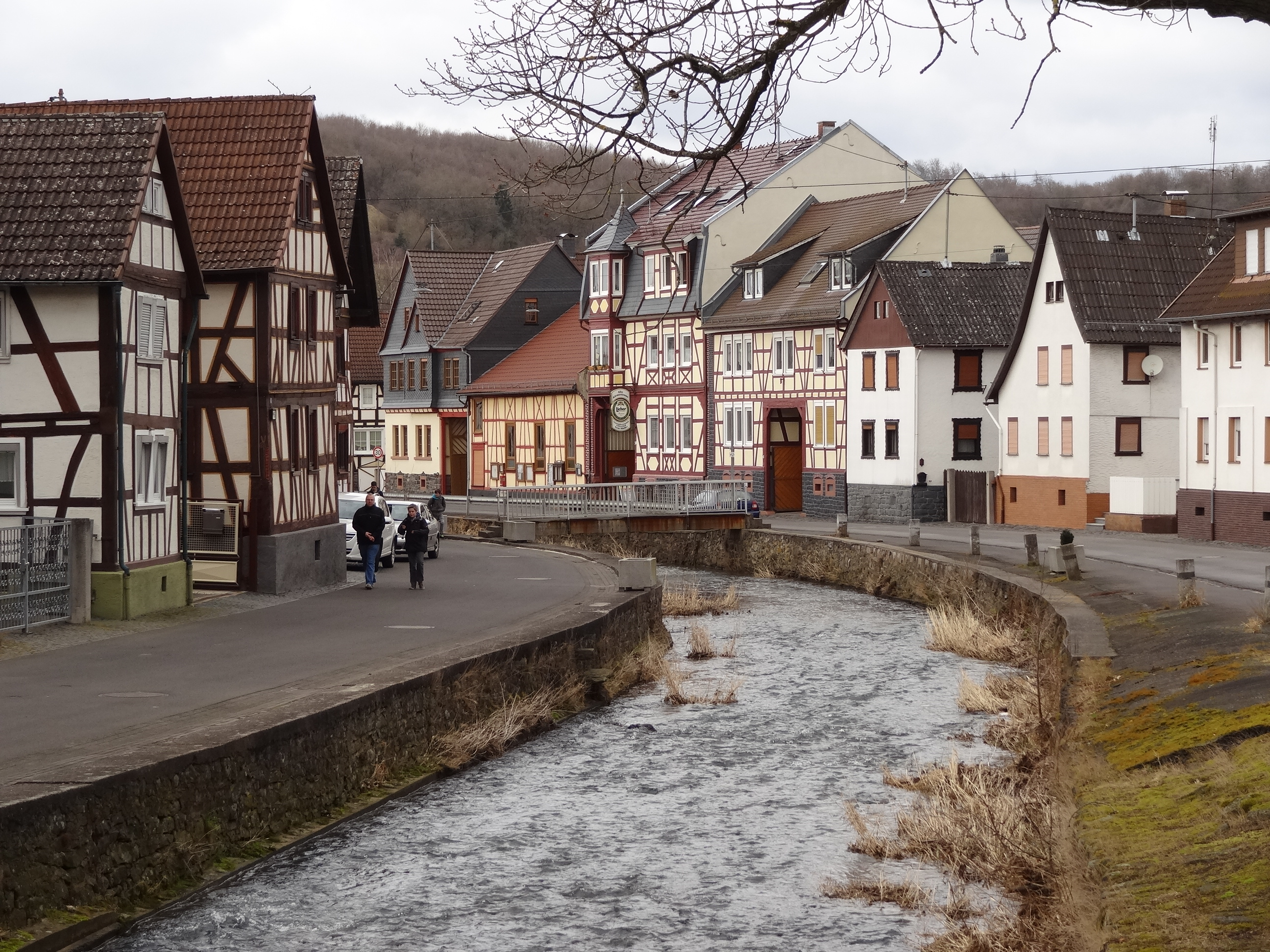 Eichelstraße (Eichelsdorf)